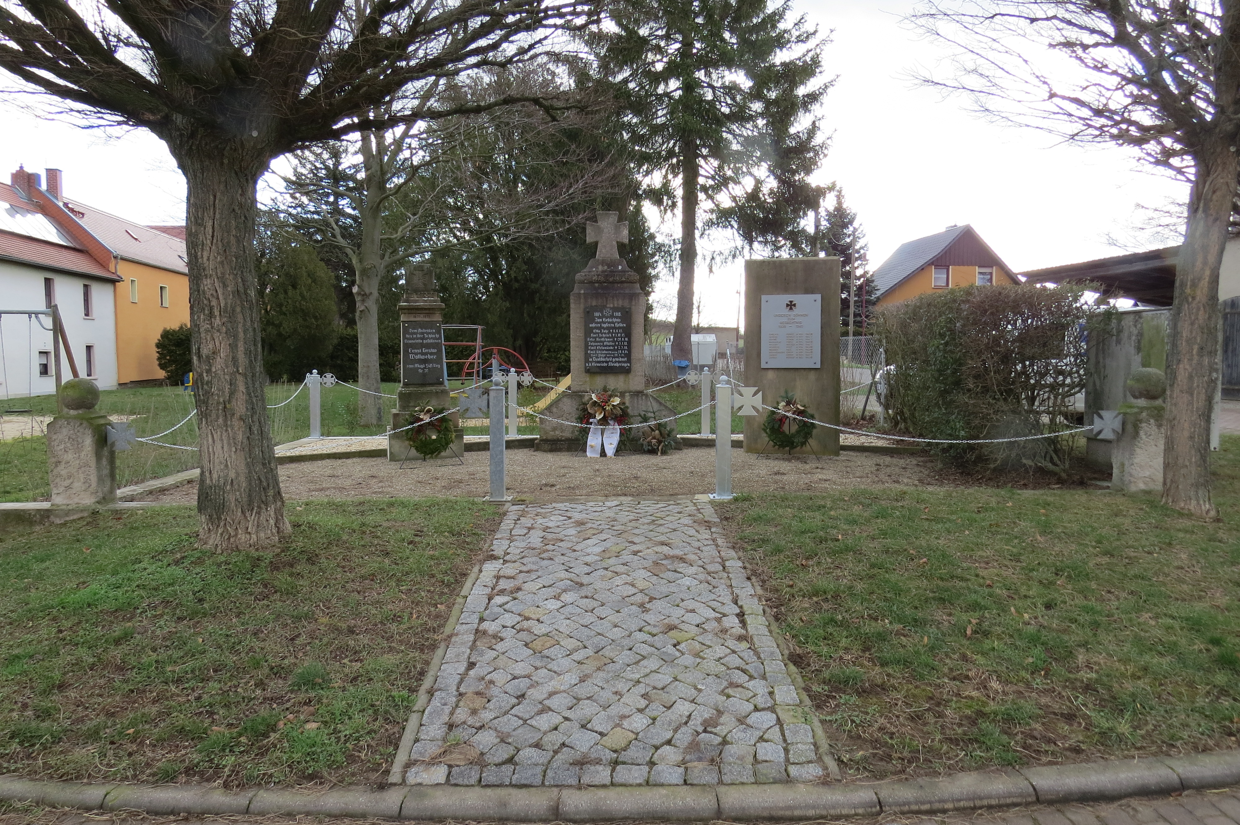 Erneuerung der Hecke im März 2018 Erneuerung der Umzäunung im Februar 2019